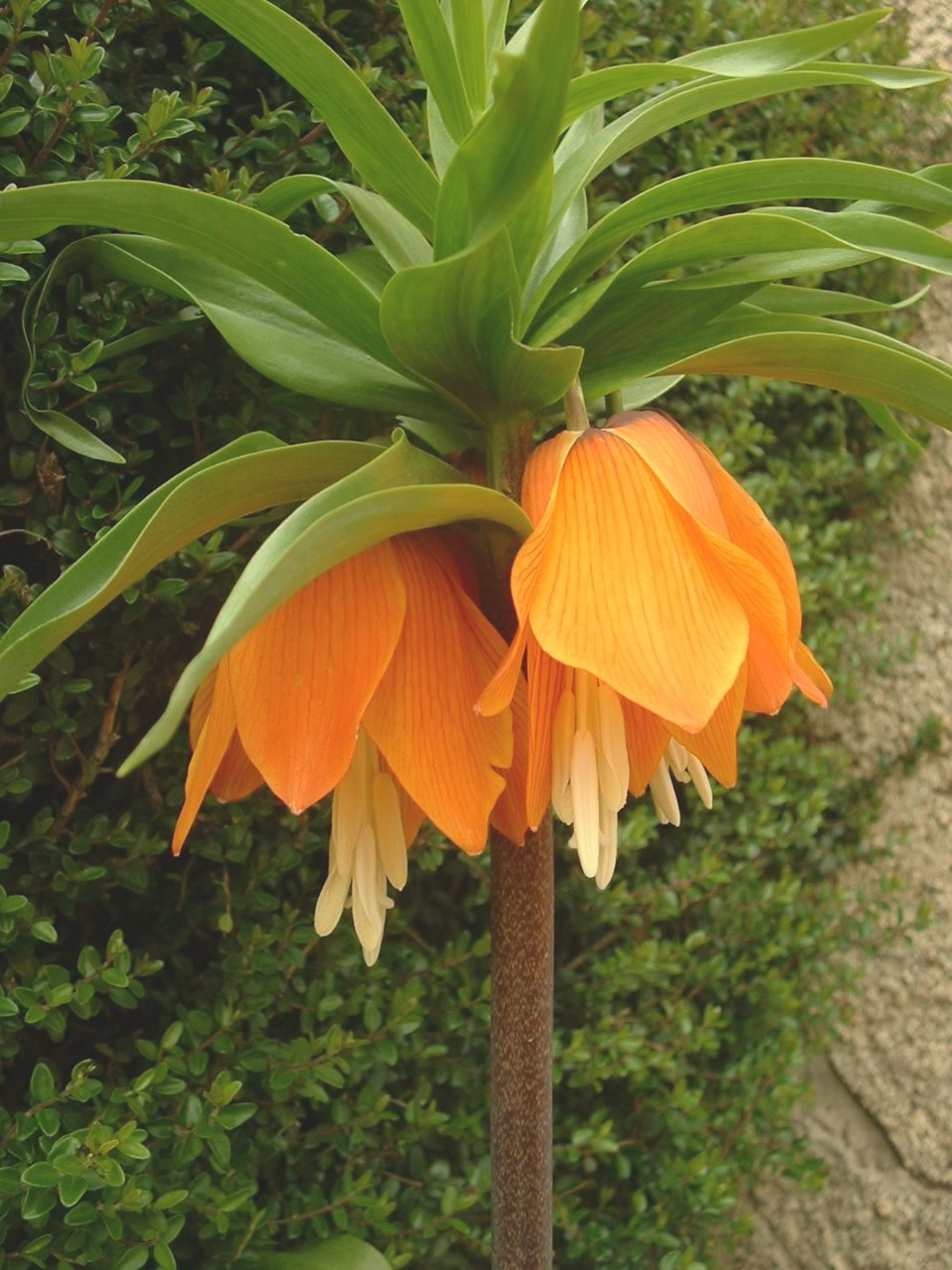 Fritillaria imperialis photo : Jeffdelonge Vantoux et Longevelle 70700 France